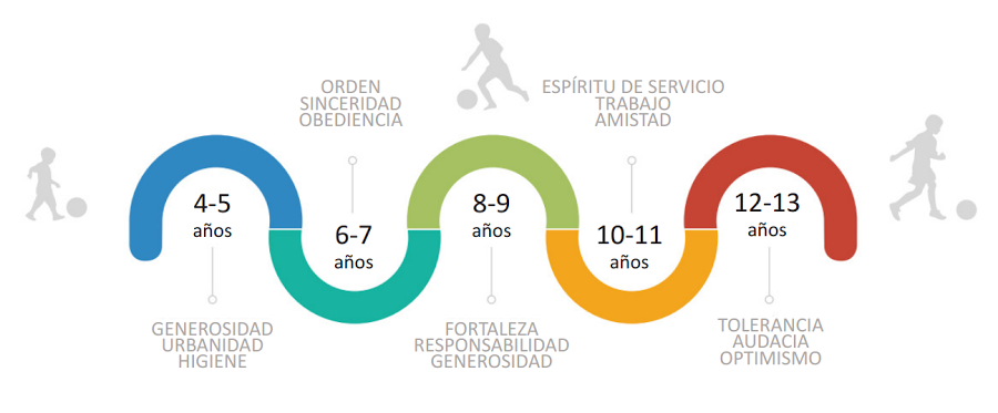 Curva de aprendizaje sobre los valores que se enseñan.